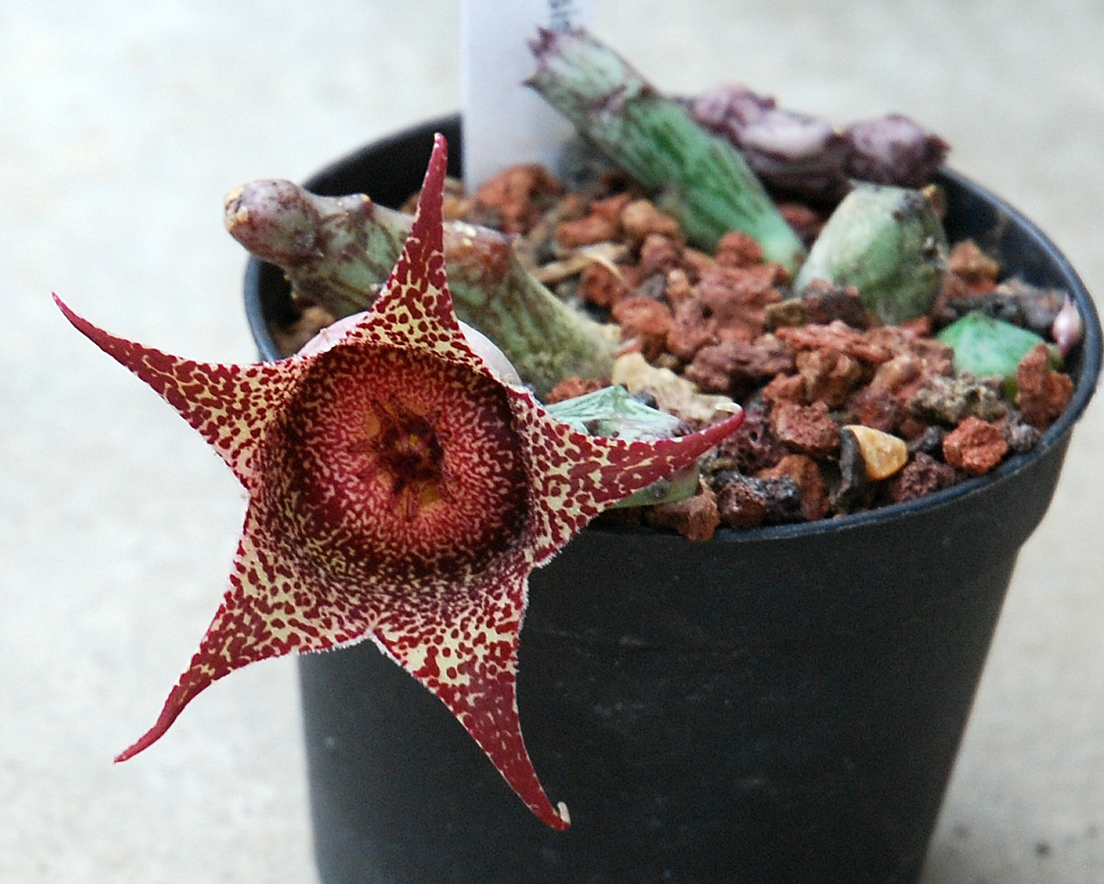 Stapeliopsis hardyi